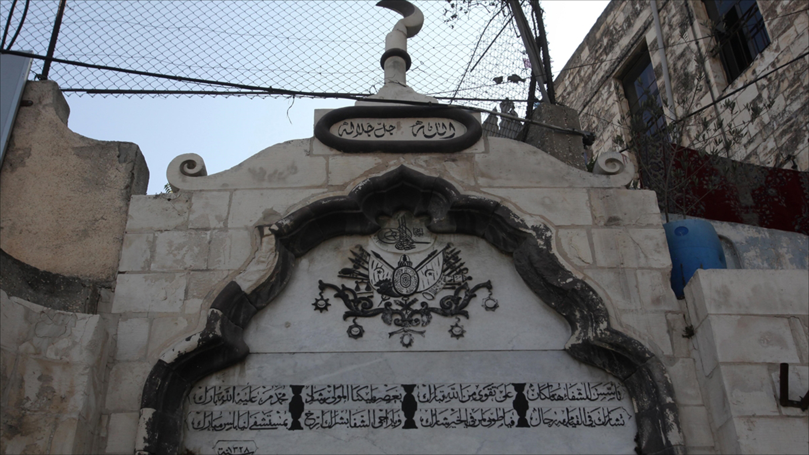 منظر عام للختم العثماني على مدخل مستشفى الوطني الحكومي وسط مدينة نابلس